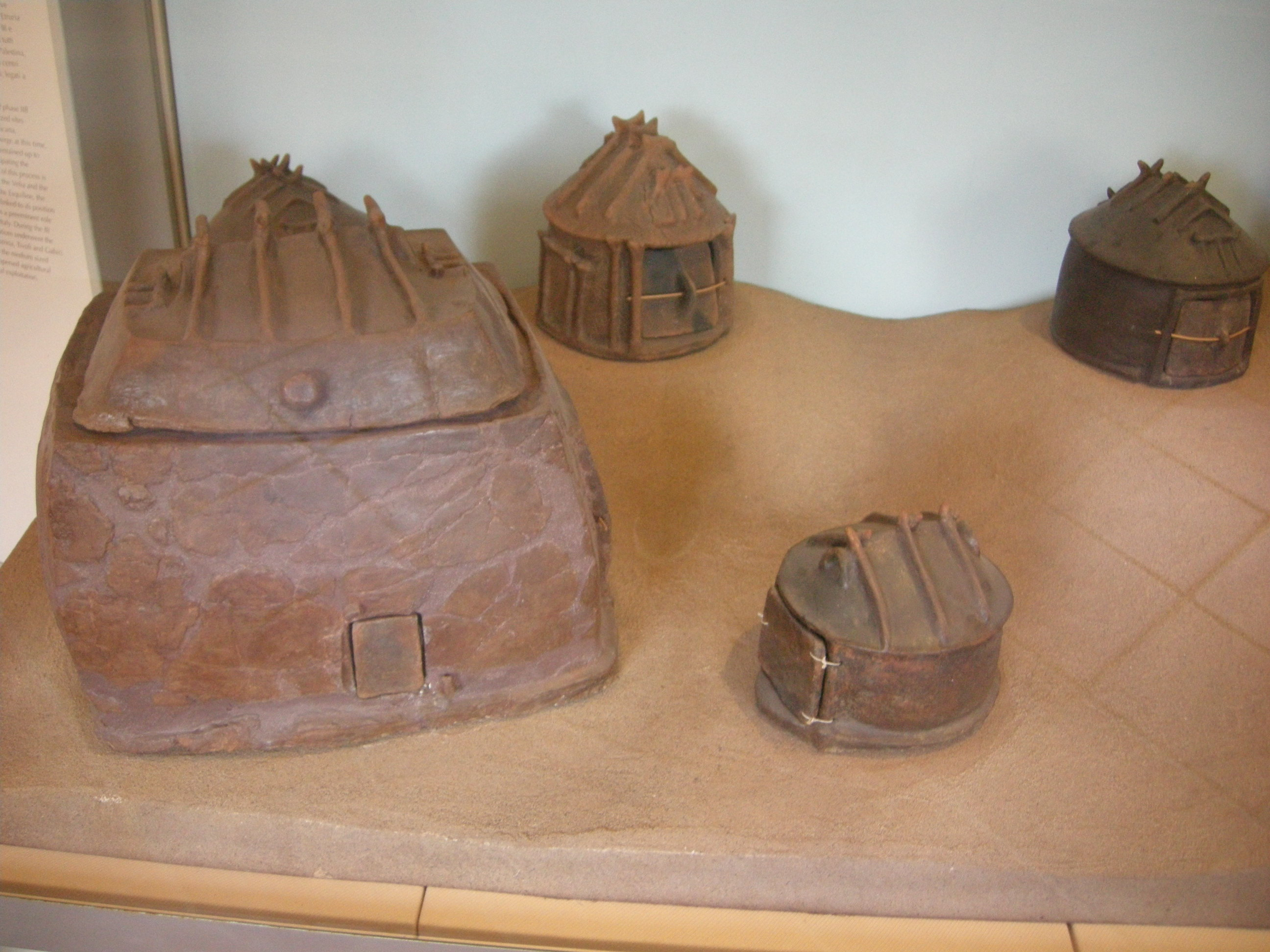 Terme di diocleziano, tombe a capanna